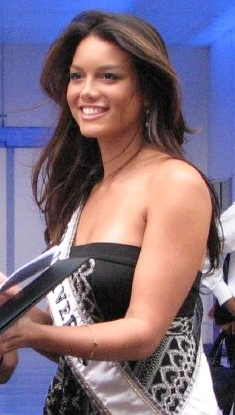 Zuleyka Rivera at Plaza Antara, Polanco, Mexico